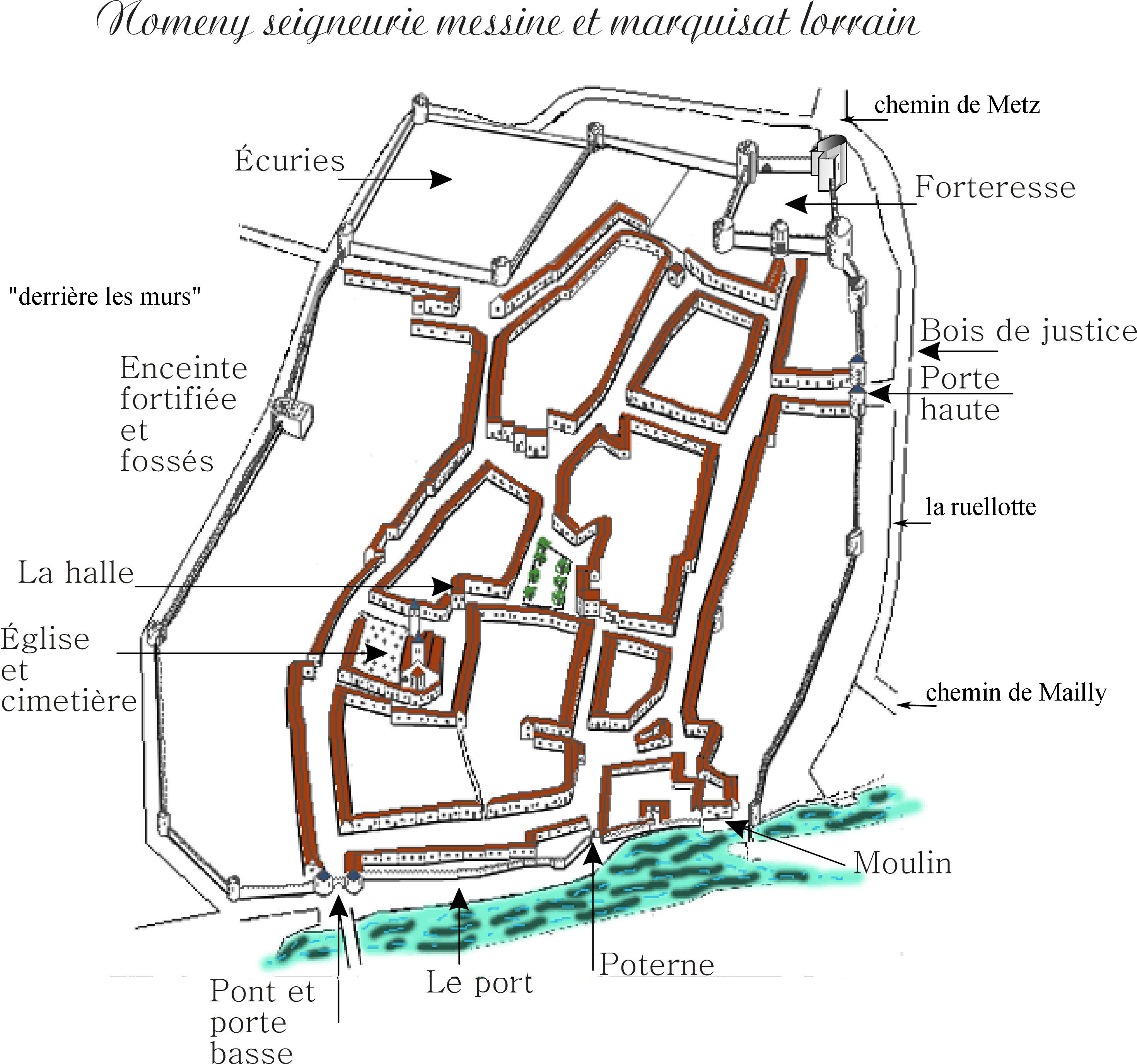 Nomeny dans ses murs au 17°s